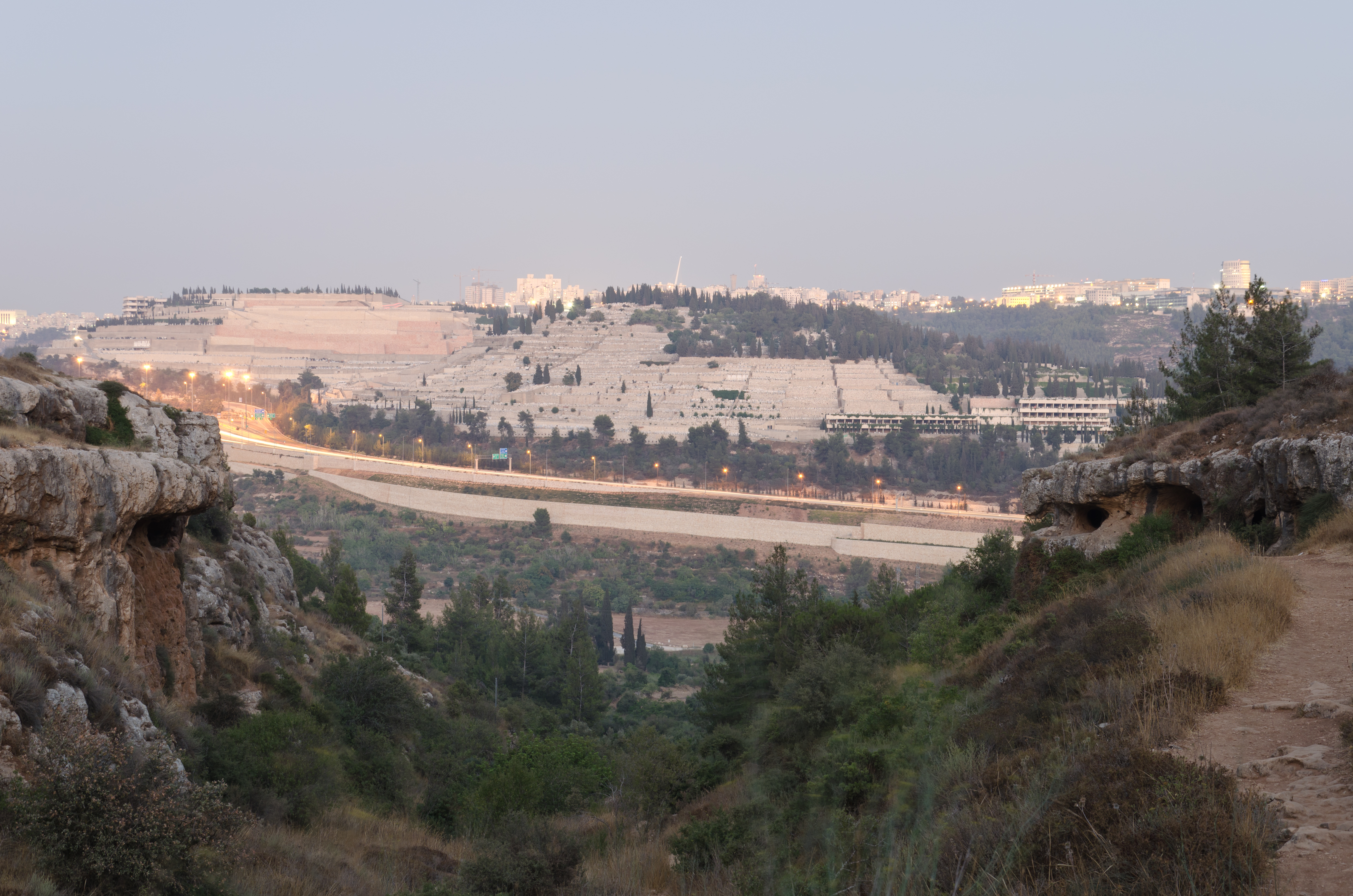 תצפית מנחל חלילים אחרי השקיעה, לכיוון עמק הארזים והכניסה לירושלים. מימין מערת חלילים, במורד הנחל נראה עמק הארזים, בהמשך כביש 1 ומעבר אליו בית הקברות הר המנוחות.